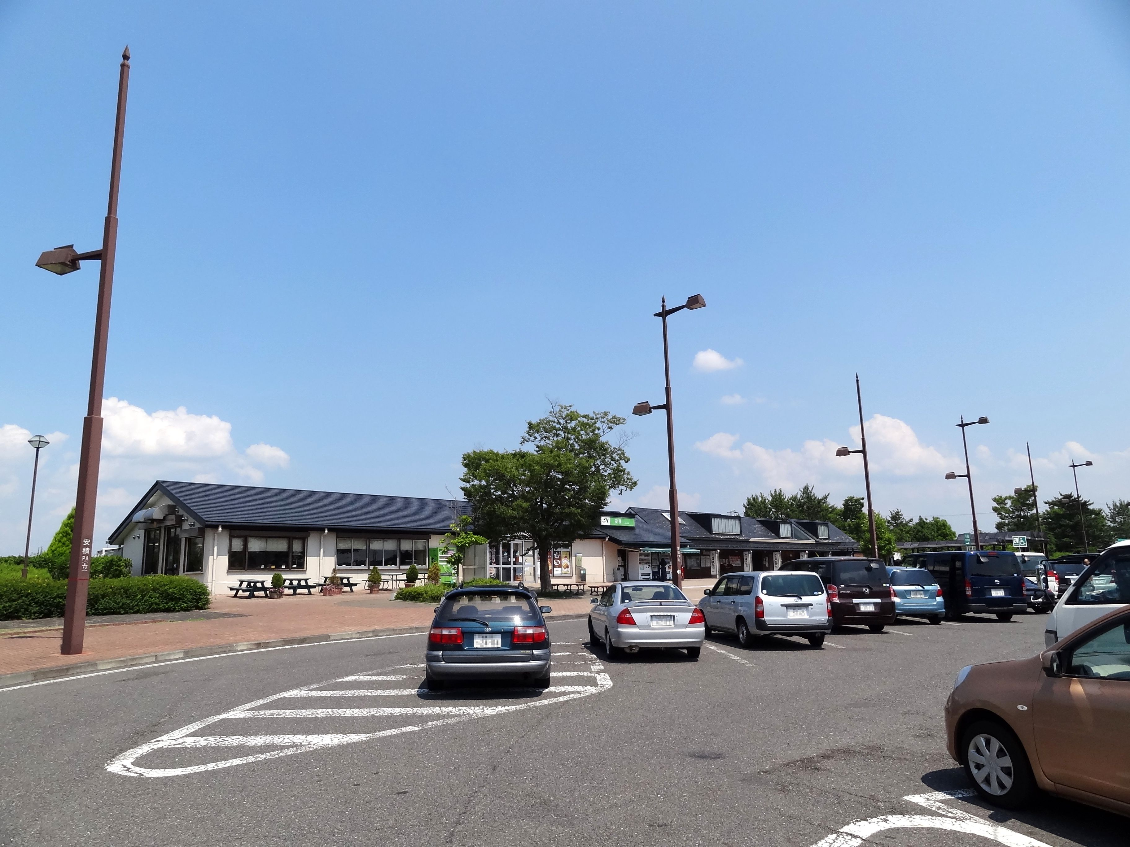 東北自動車道 安積パーキングエリア（上り線）